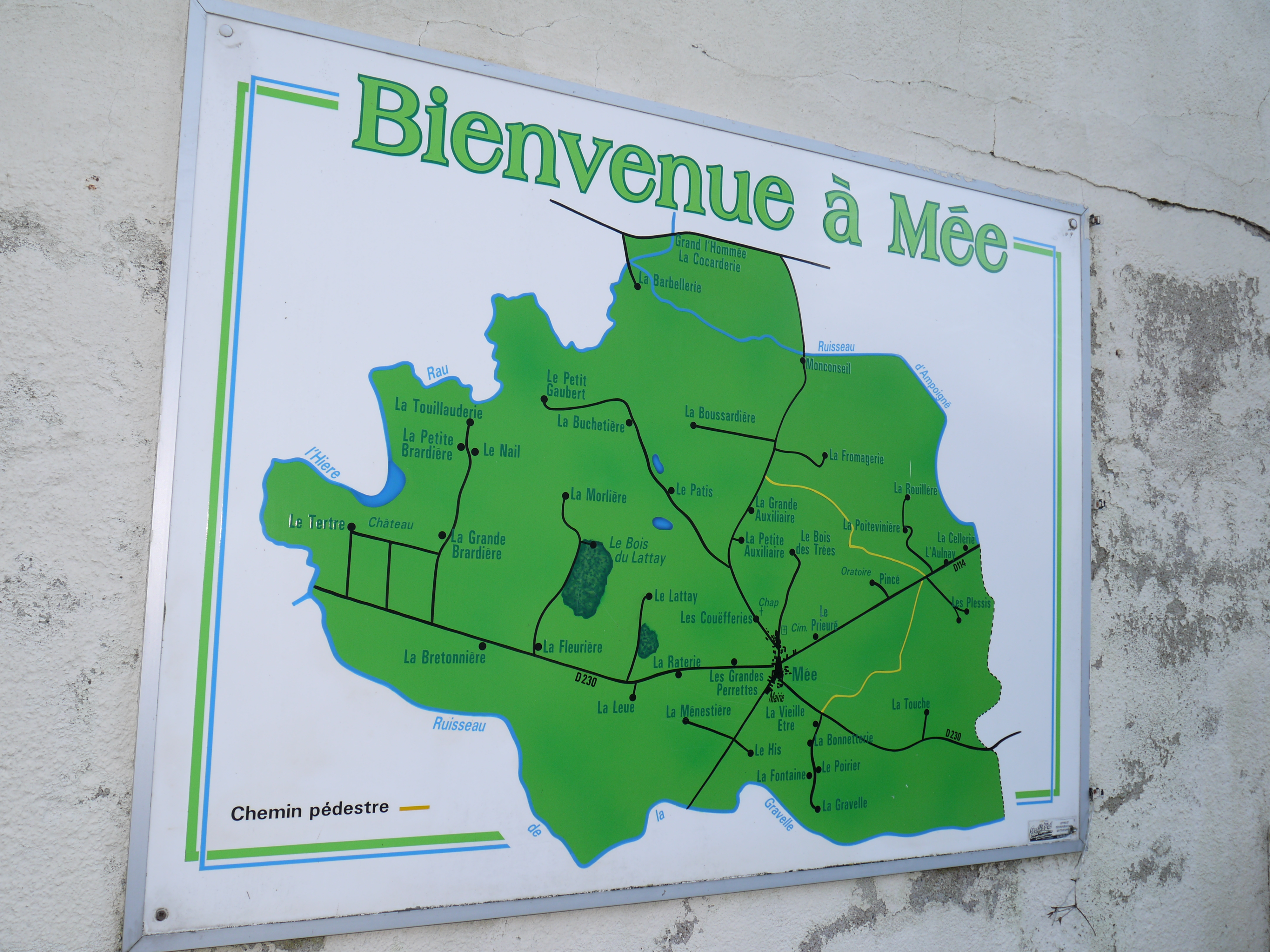 Plan de la commune de Mée